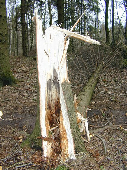 Schwarze Rossameise (Camponotus herculeanus), Nest in Fichte, freigelegt durch Windbruch